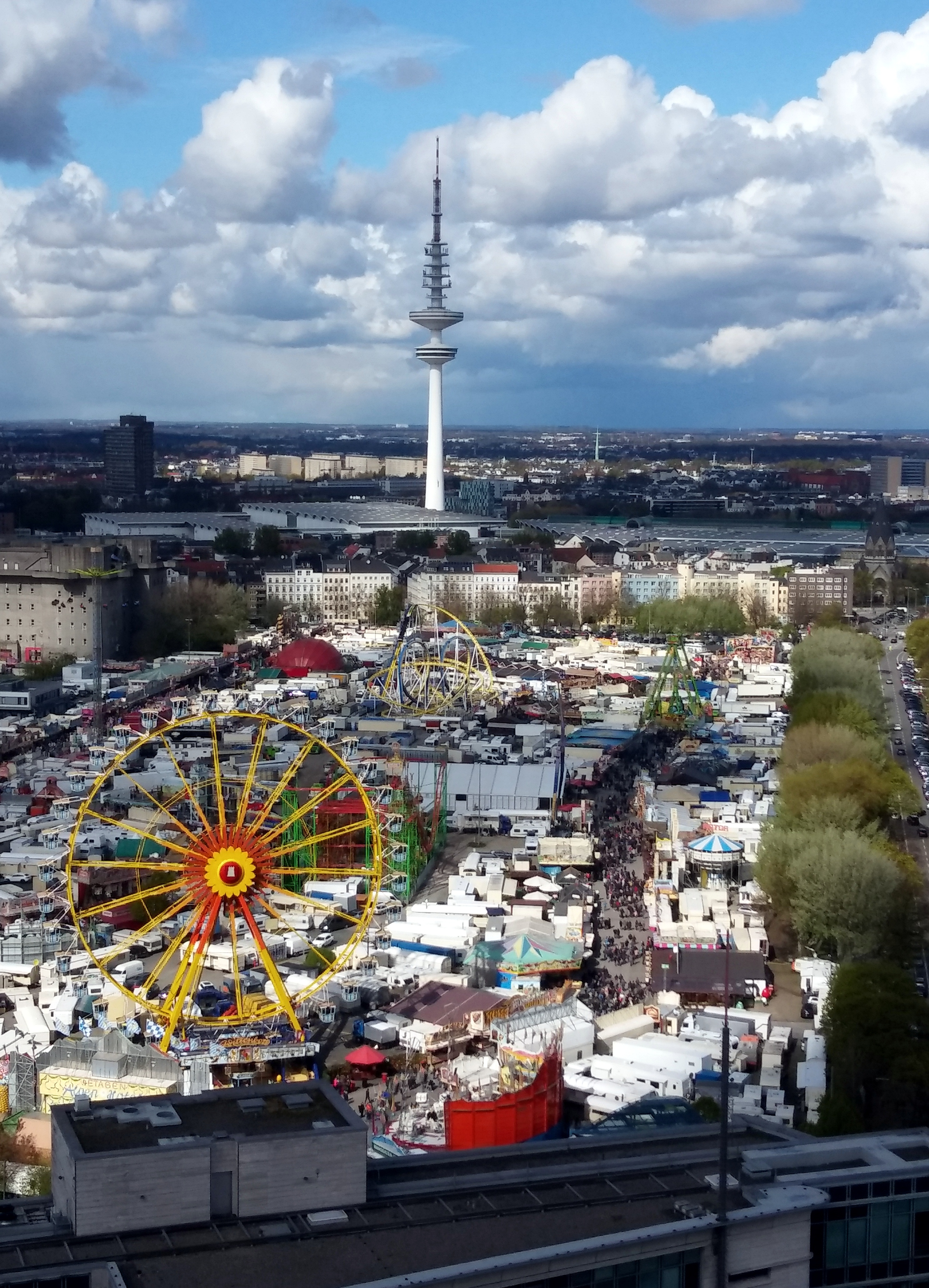 Hamburger Dom im April 2017 auf dem Heiligengeistfeld, rechts Glacischaussee